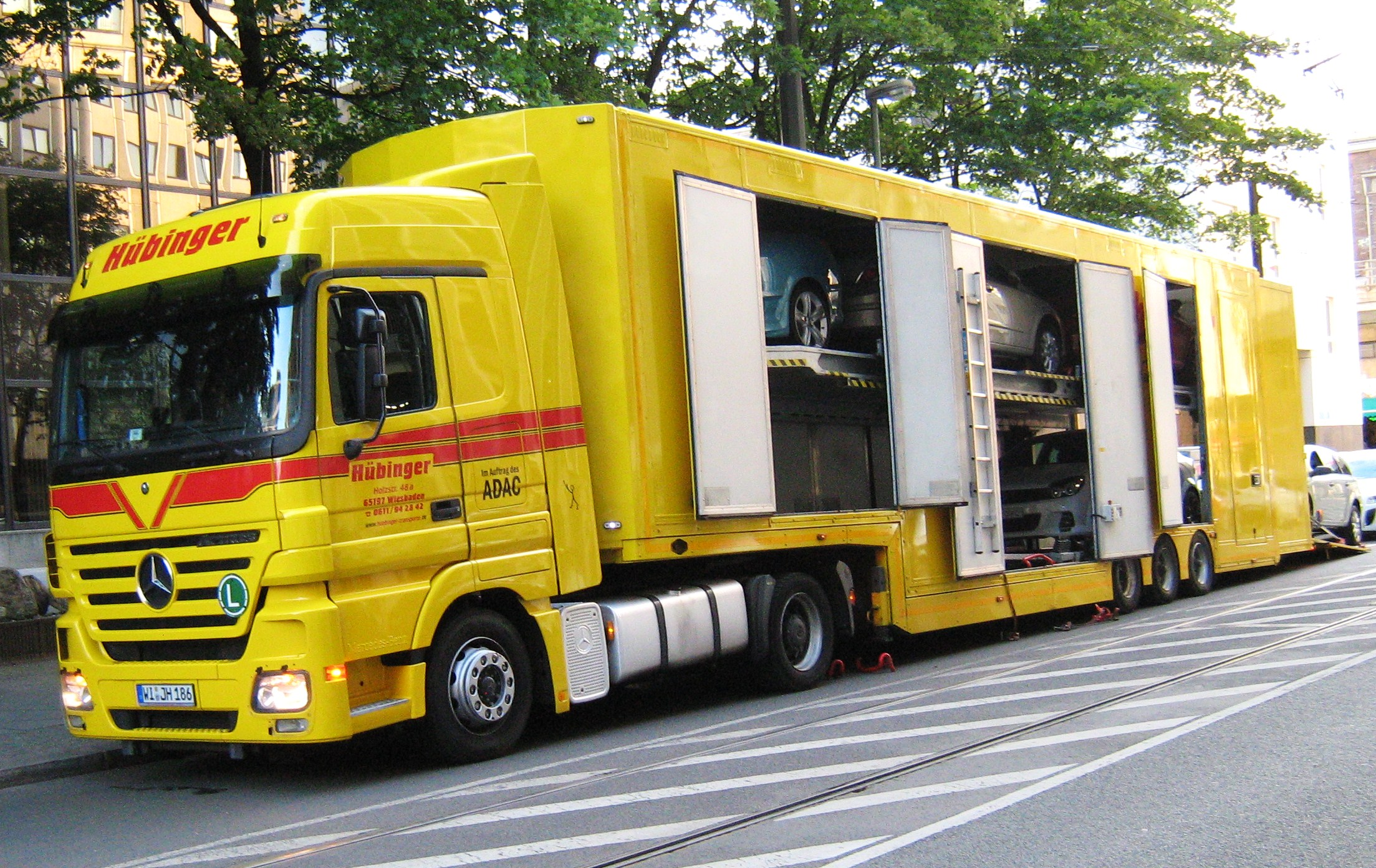 Autotransporter - Auflieger mit Mercedes-Benz LKW 2009 in Berlin